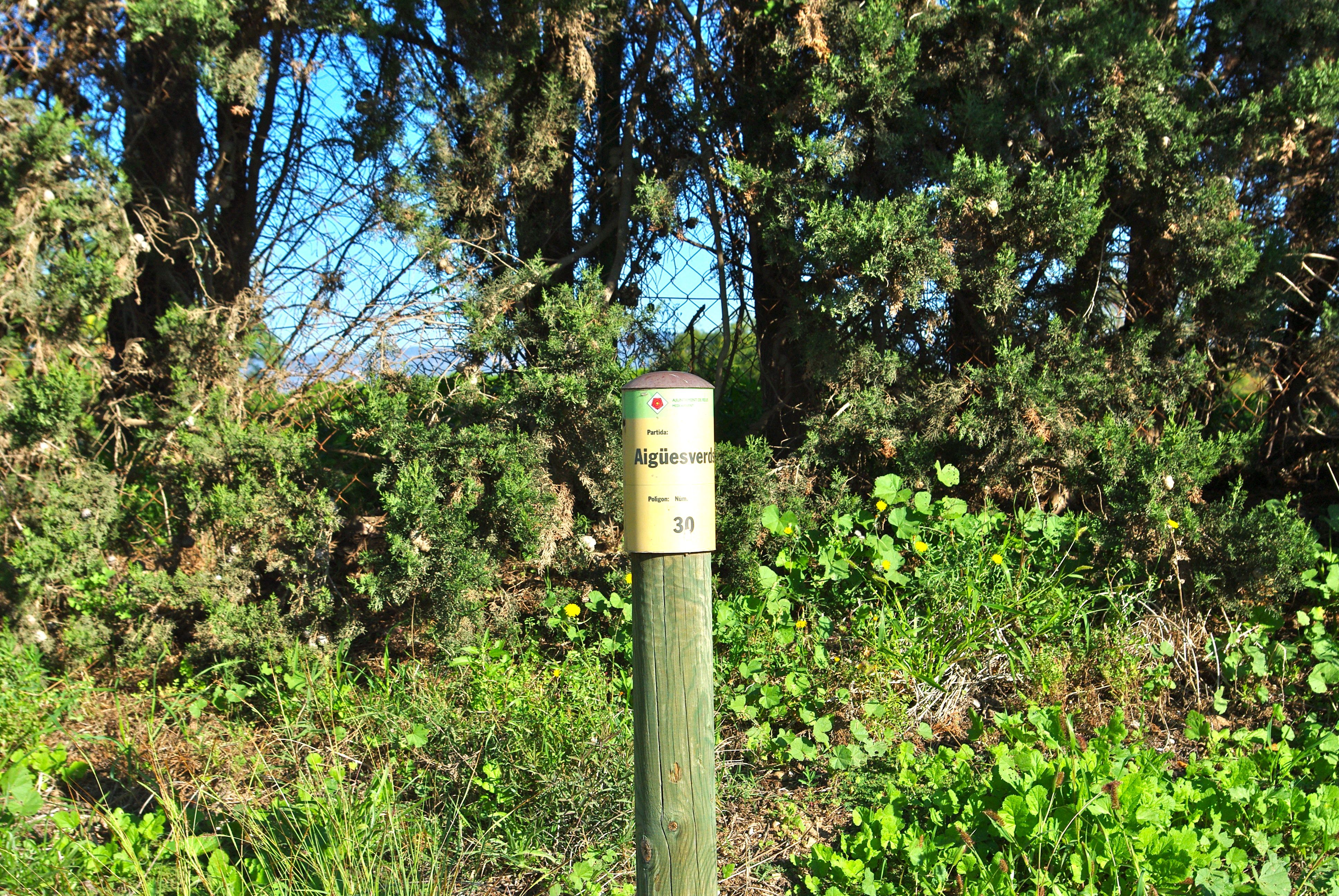 Fita indicadora d'una parcel·la de la partida d'Aigüesverds, al terme de Reus